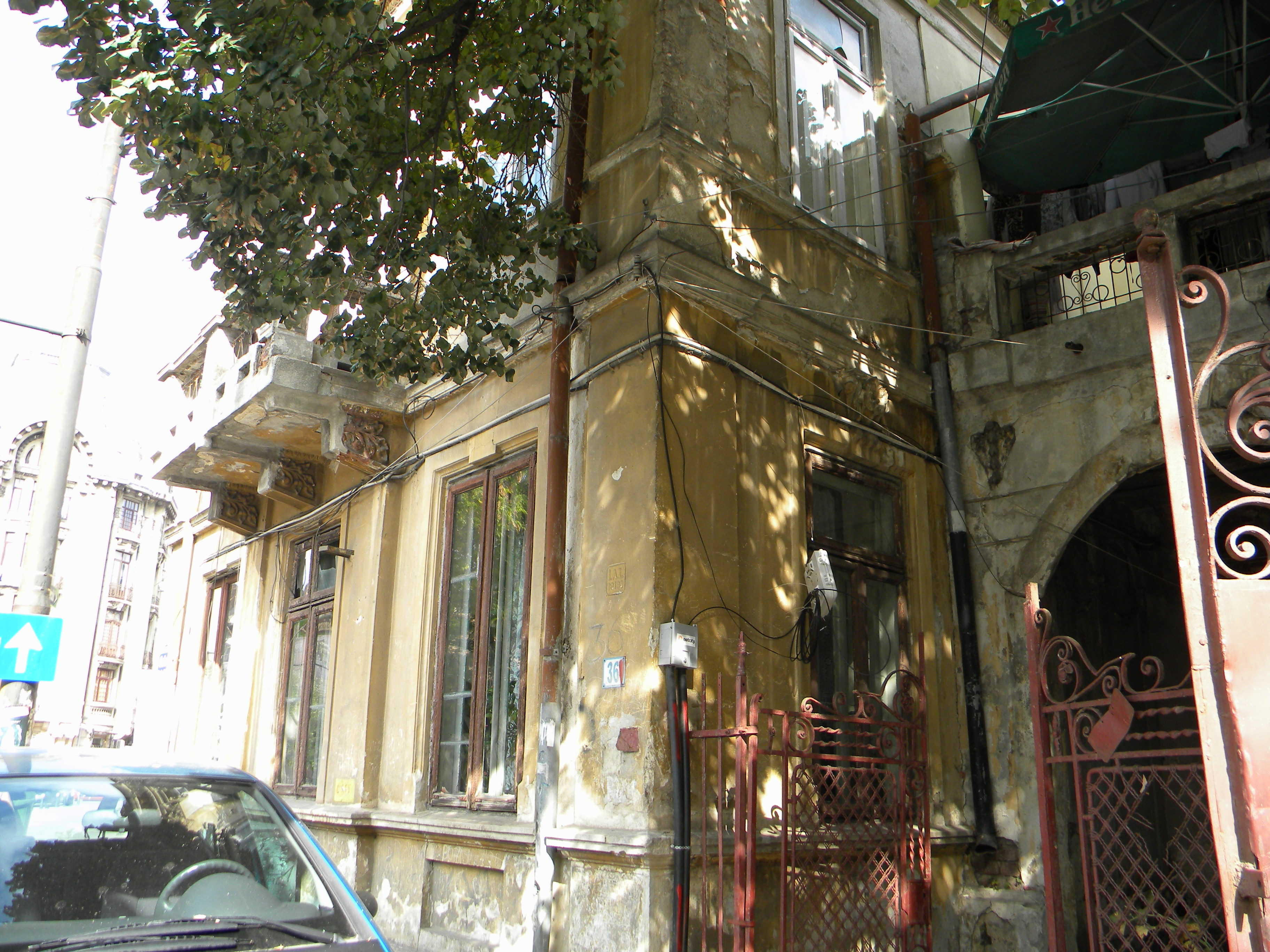 Bucuresti, Romania, Casa pe Calea Grivitei nr. 36, sect. 1